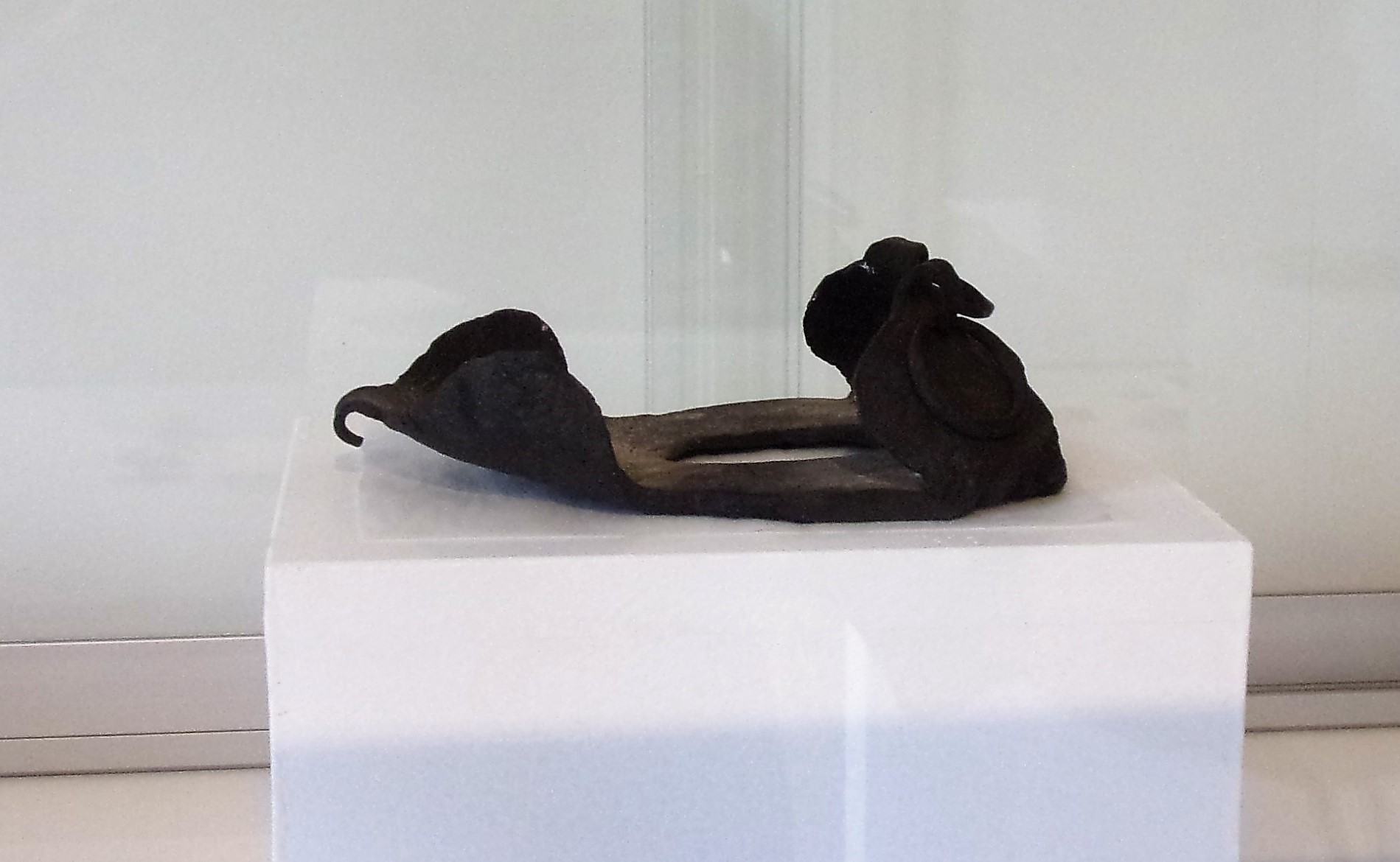 Hipposandale trouvé à Reignac-sur-Indre. Collection de la Société archéologique de Touraine. Dépôt : écomusée du Véron (Savigny-en-Véron).